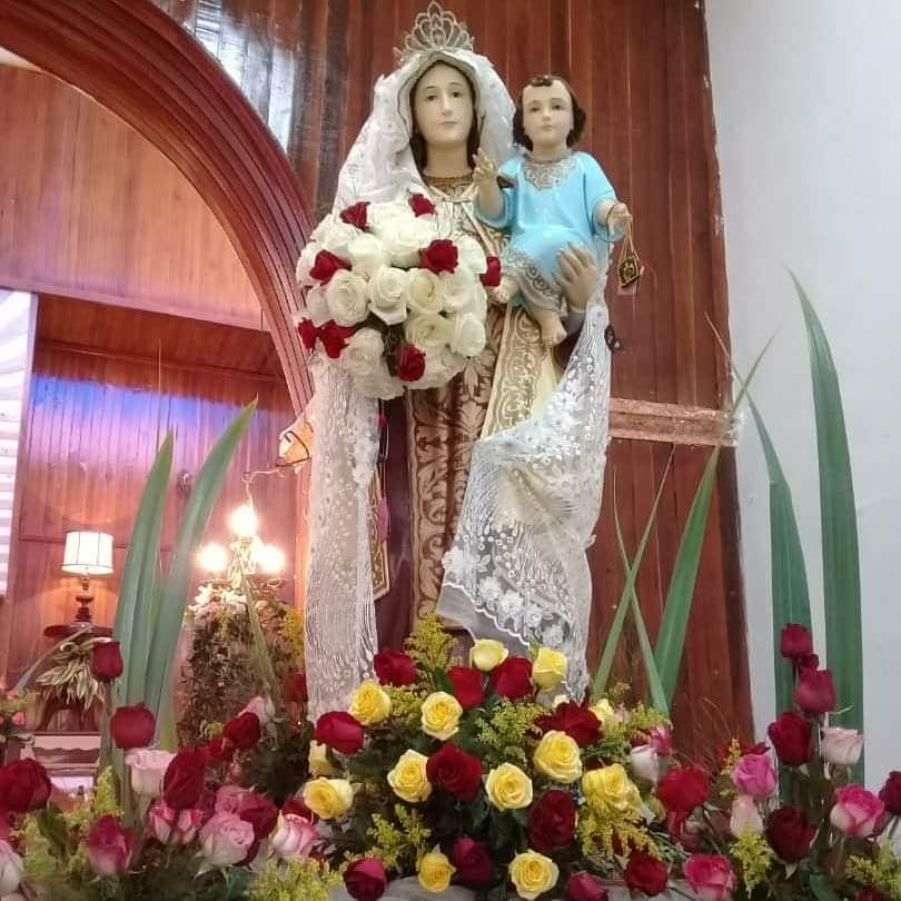 Virgen del Carmen